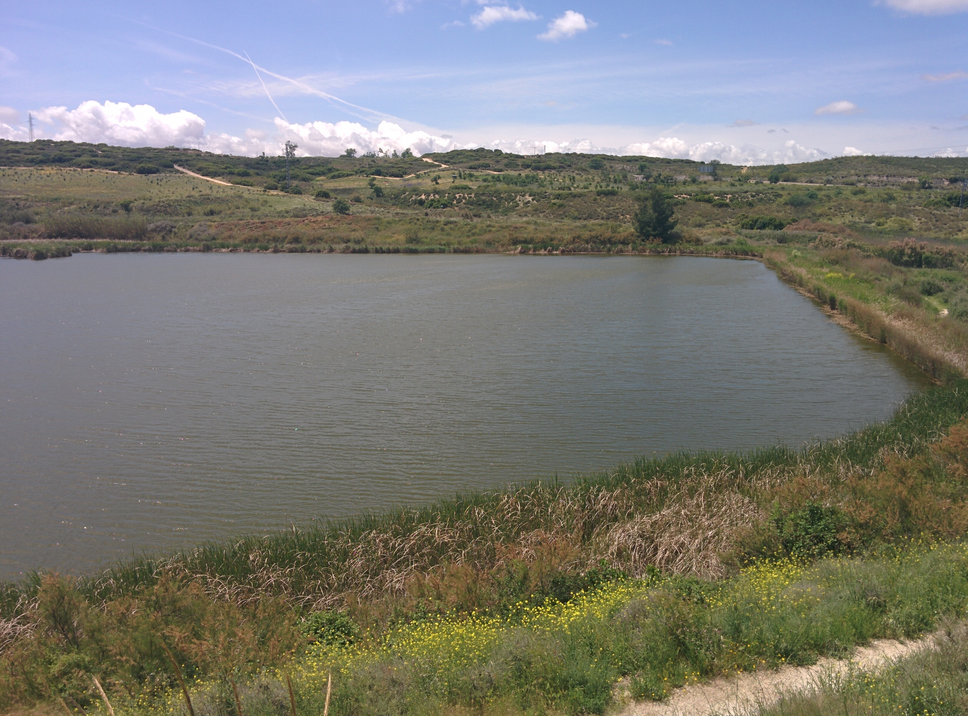 Mar de Ontígola. LIC Vegas, cuestas y páramos del sureste de Madrid. This is a photography of a Special Area of Conservation in Spain with the ID: ES3110006. Natura2000 entry, EEA entry